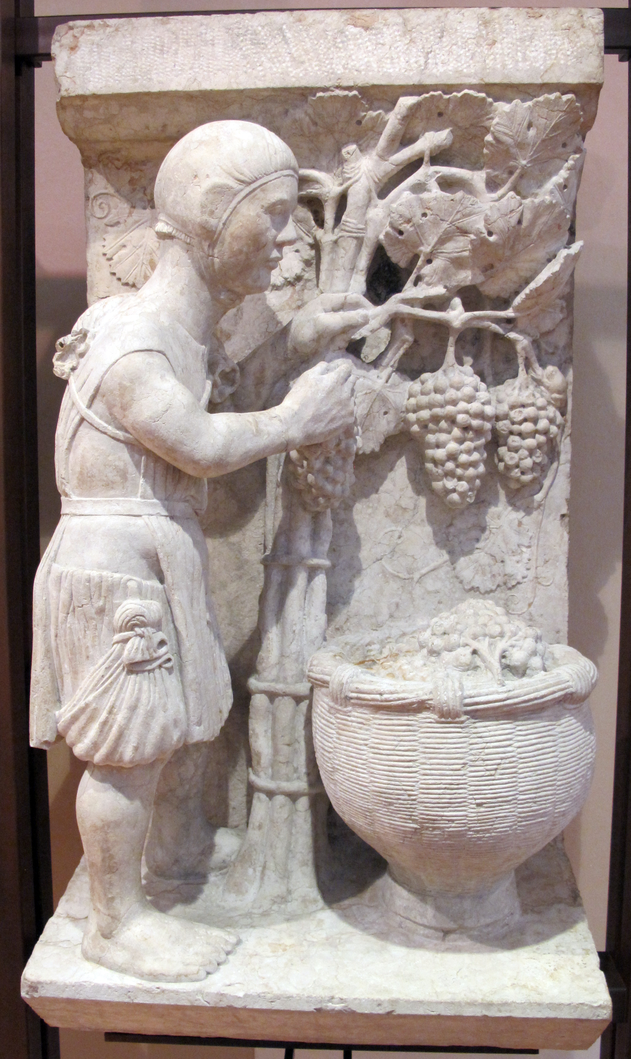 Museo della Cattedrale This is a photo of a monument which is part of cultural heritage of Italy.